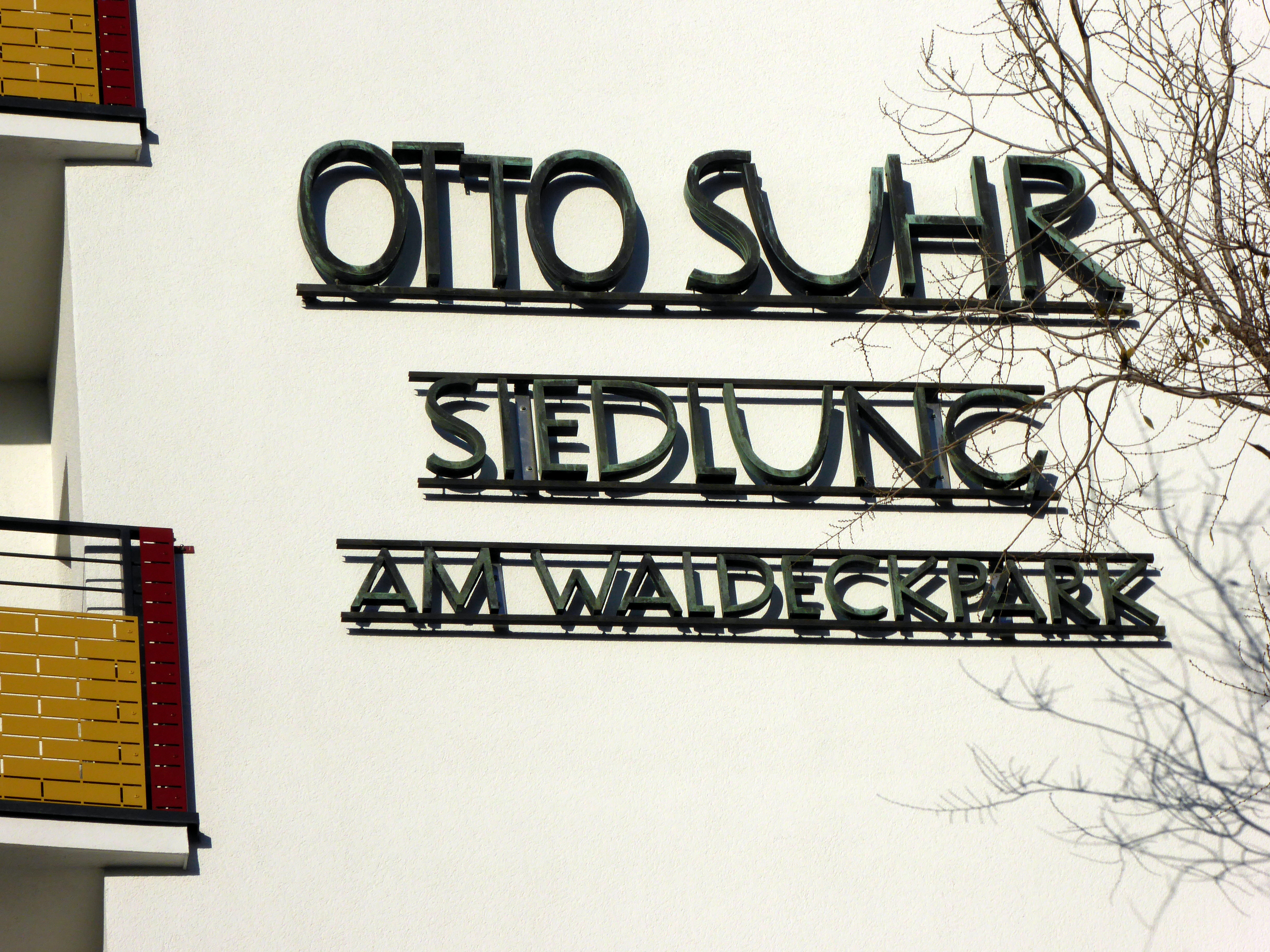 Berlin-Kreuzberg Alexandrinenstraße Otto-Suhr-Siedlung